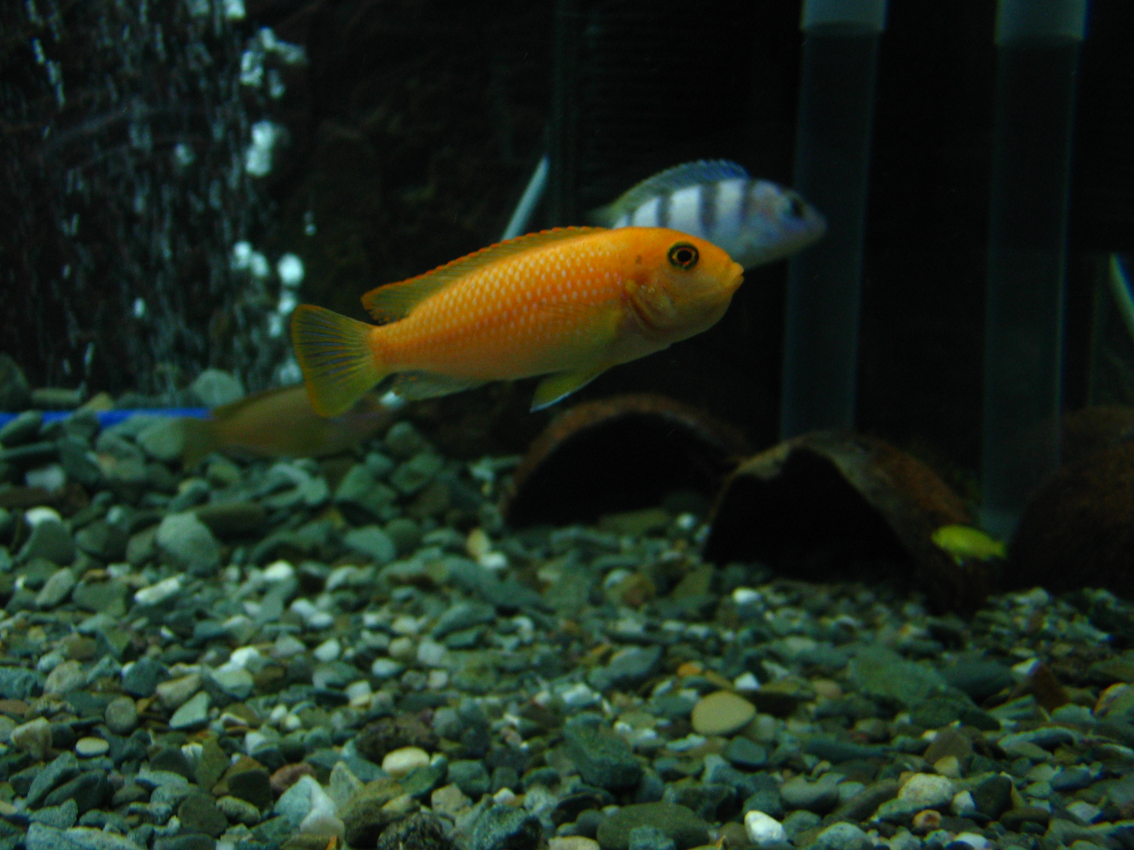 Samica pyszczaka Maylandia Estherae Red-red inkubująca w pysku ikrę.